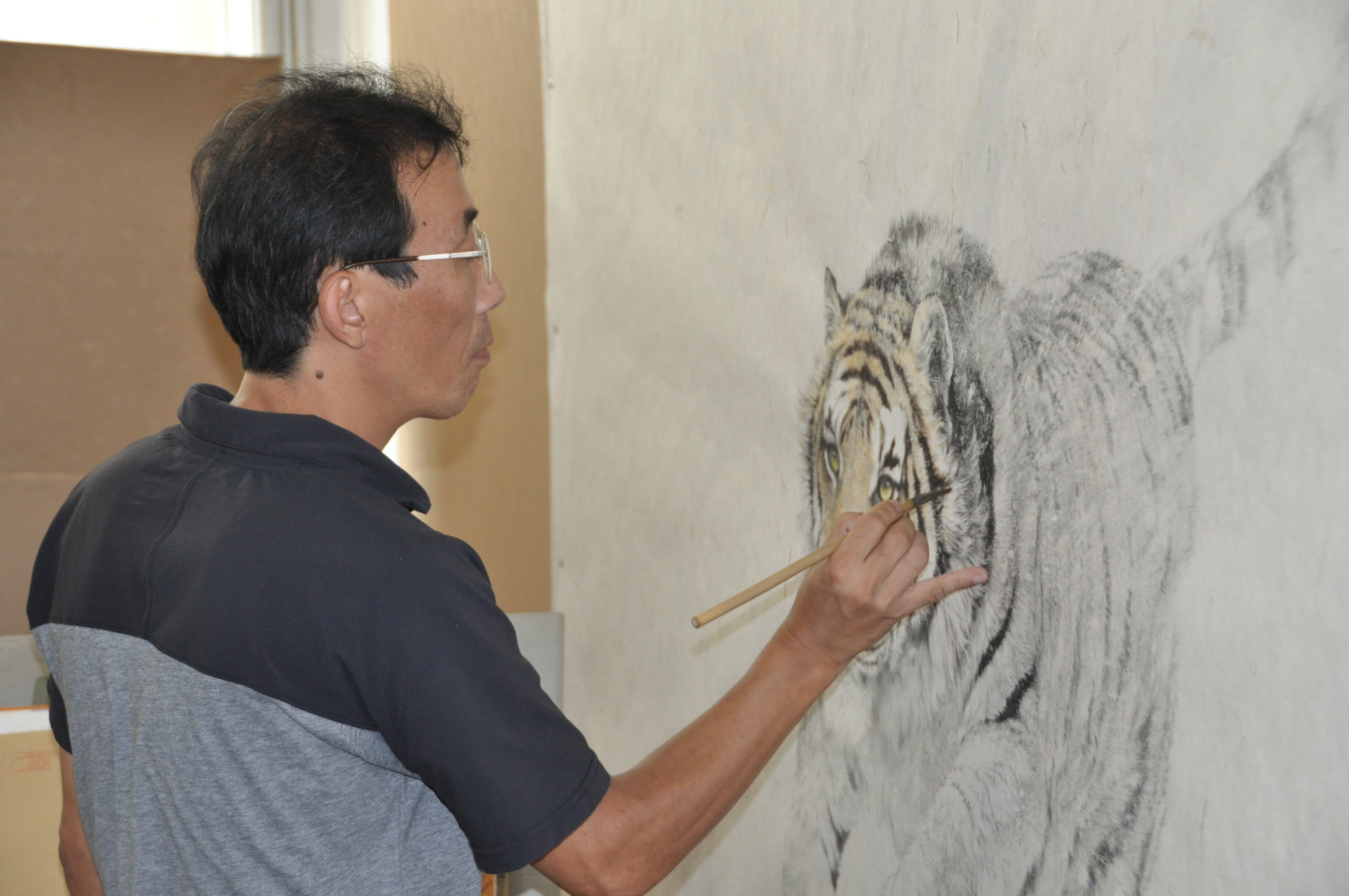 Artist at Mansudae Art Studio, Pyongyang